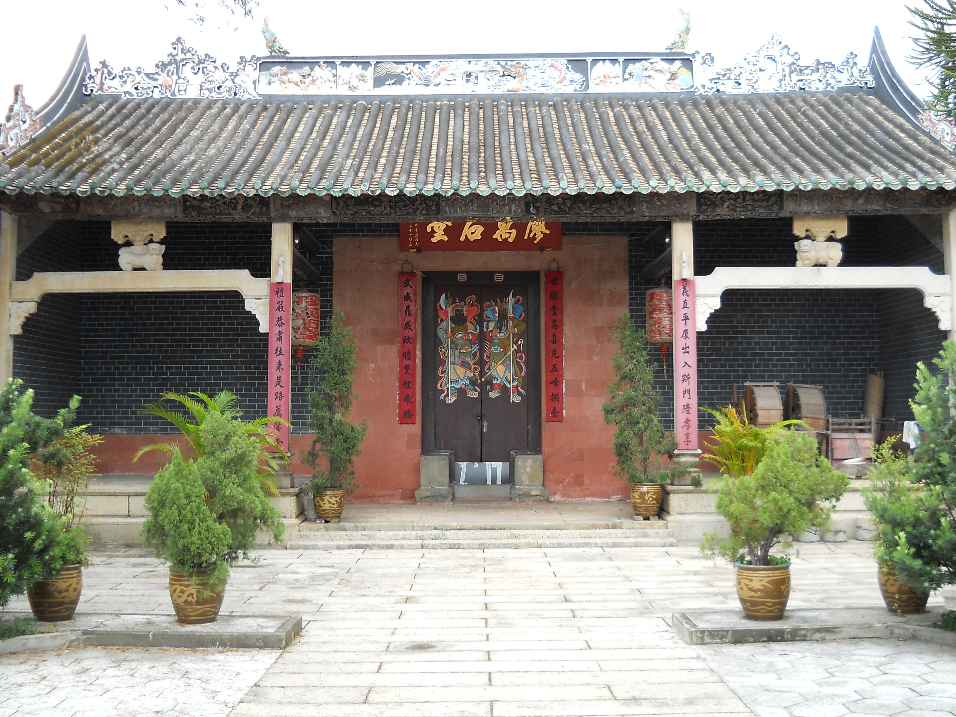 中文（香港）: 廖萬石堂